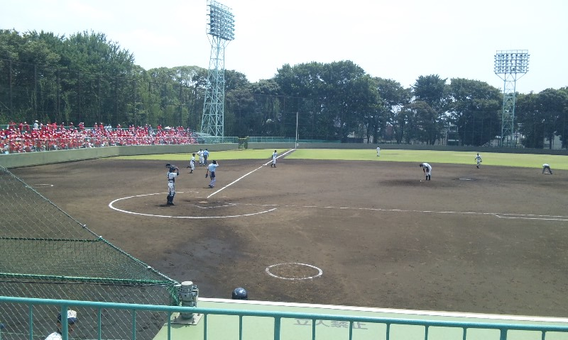 全国高等学校定時性通信制軟式野球大会の師友塾高校（広島県）対高田南城高校（新潟県）の試合の様子です。